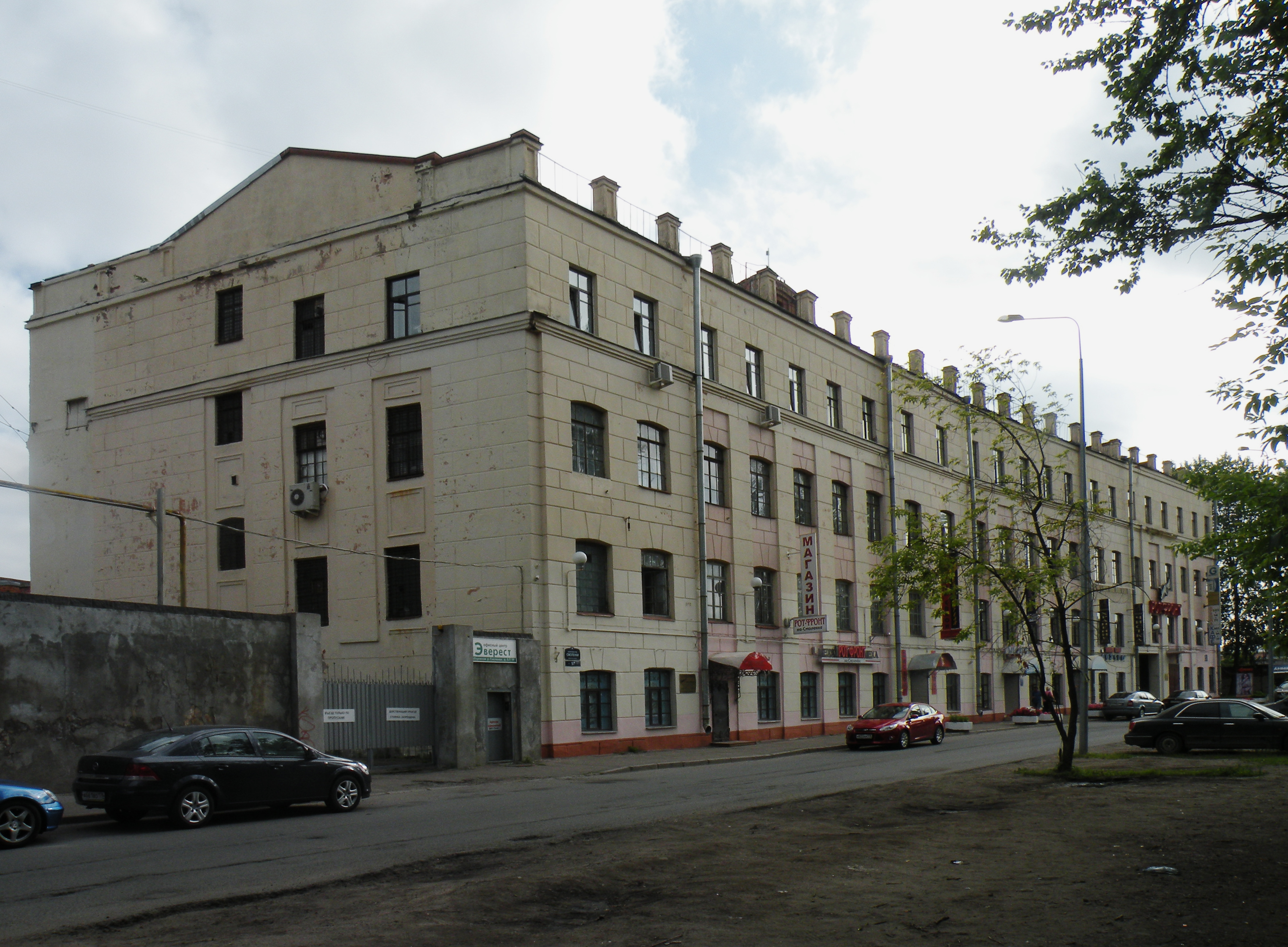 I.G.Kebke manufakture.